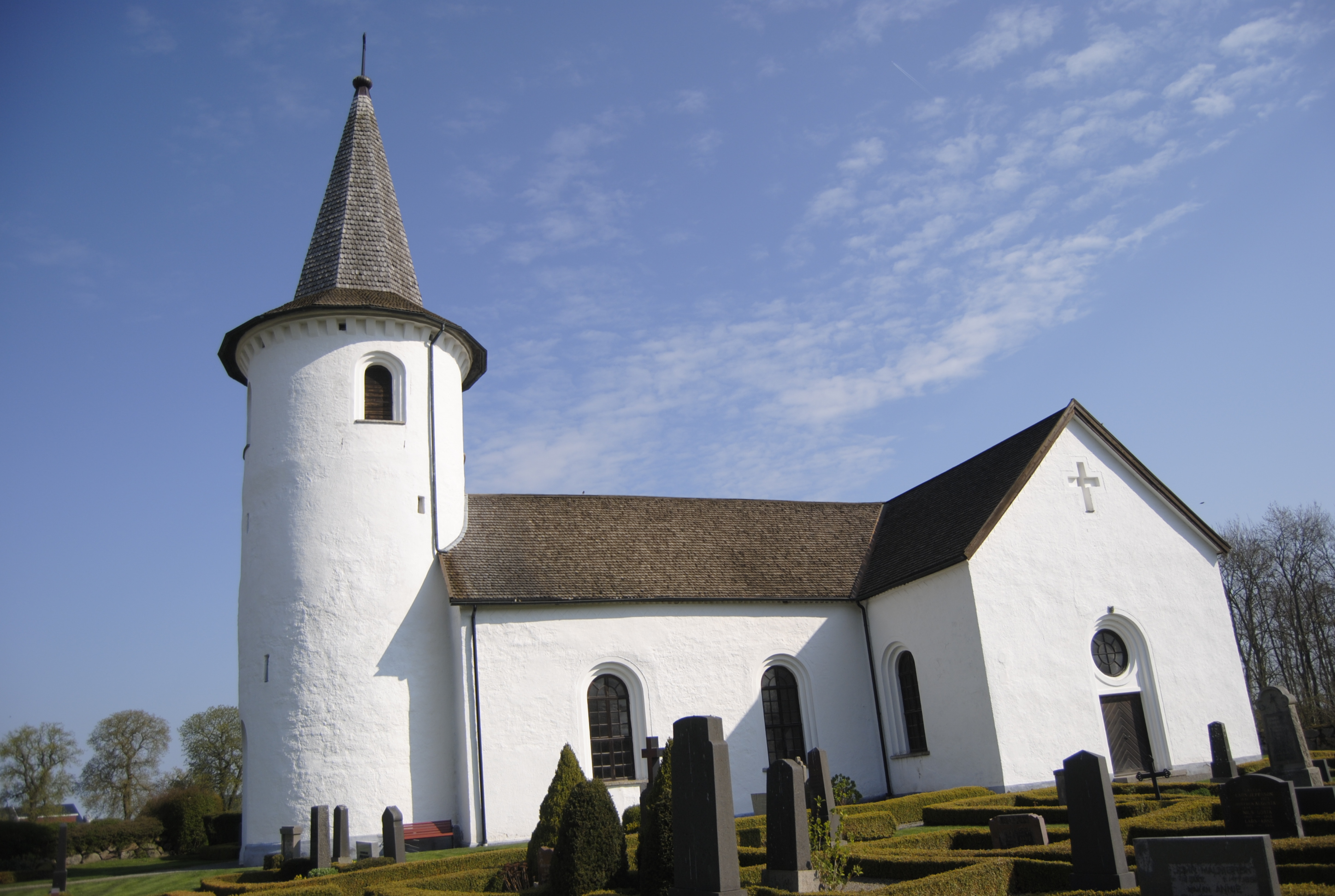 Bollerups kyrka April 2014